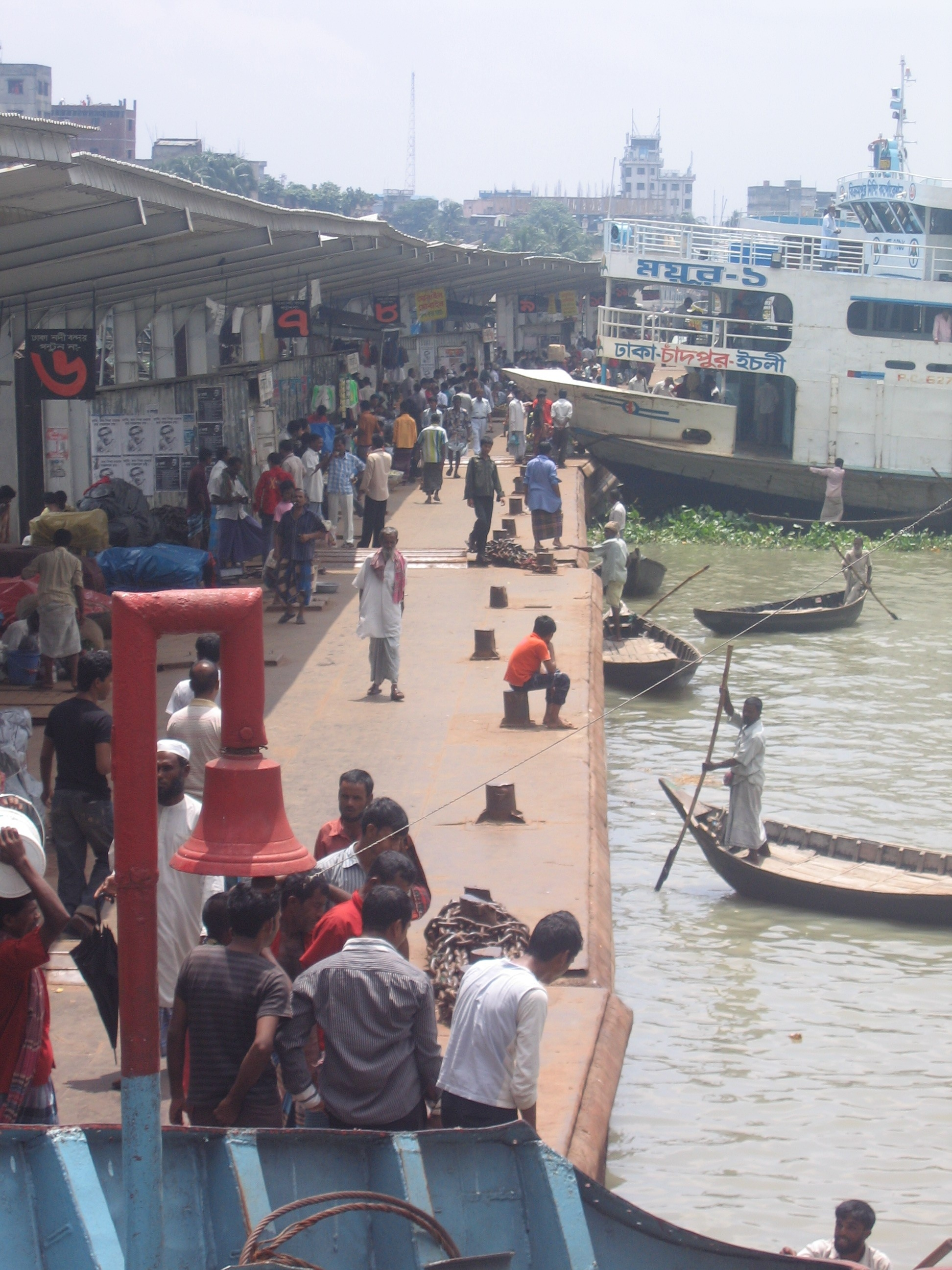 Photograph of Sadarghat, Dhaka, Bangladesh taken by Faizul Latif Chowdhury